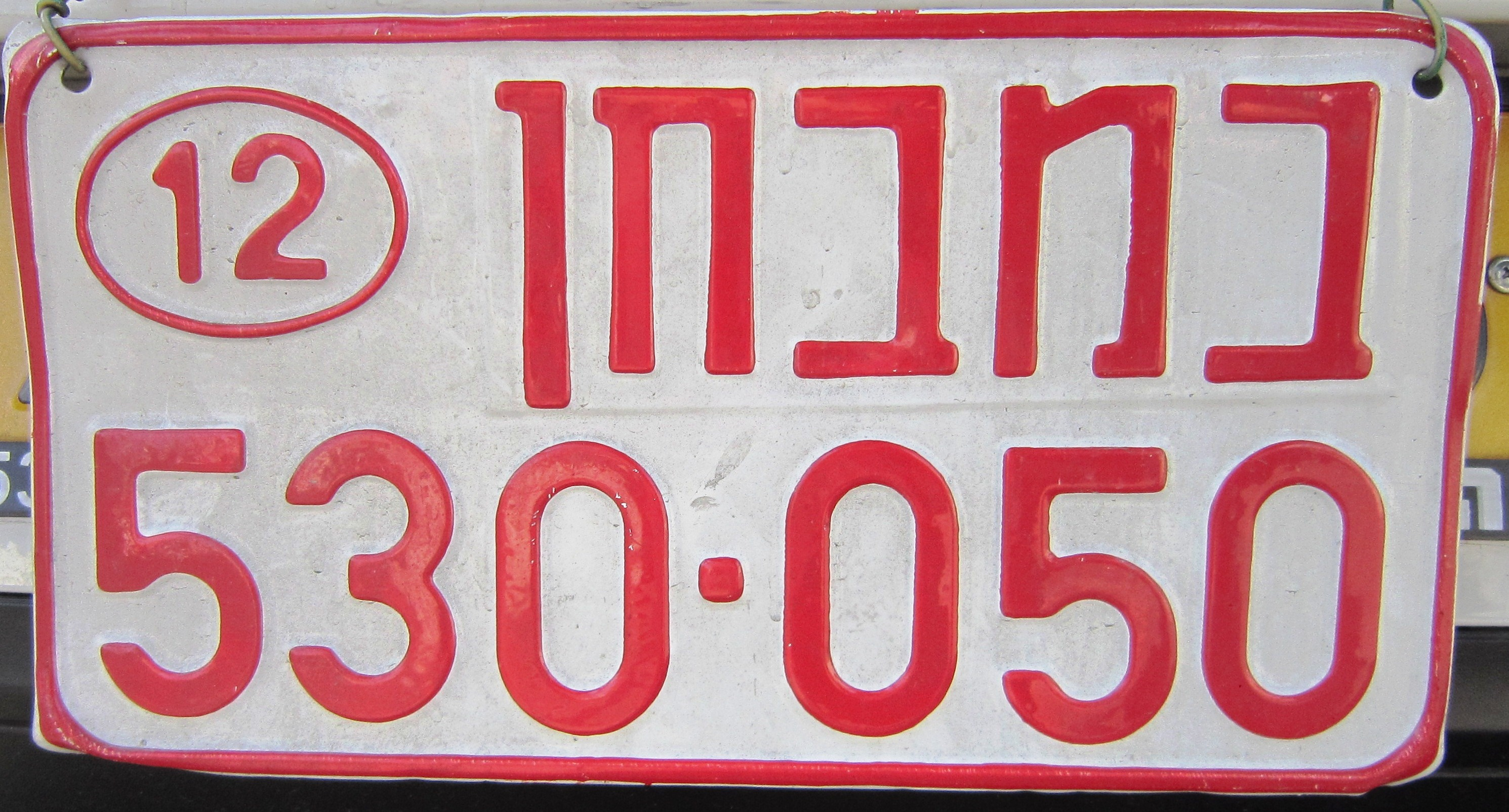 Israel driving test plate